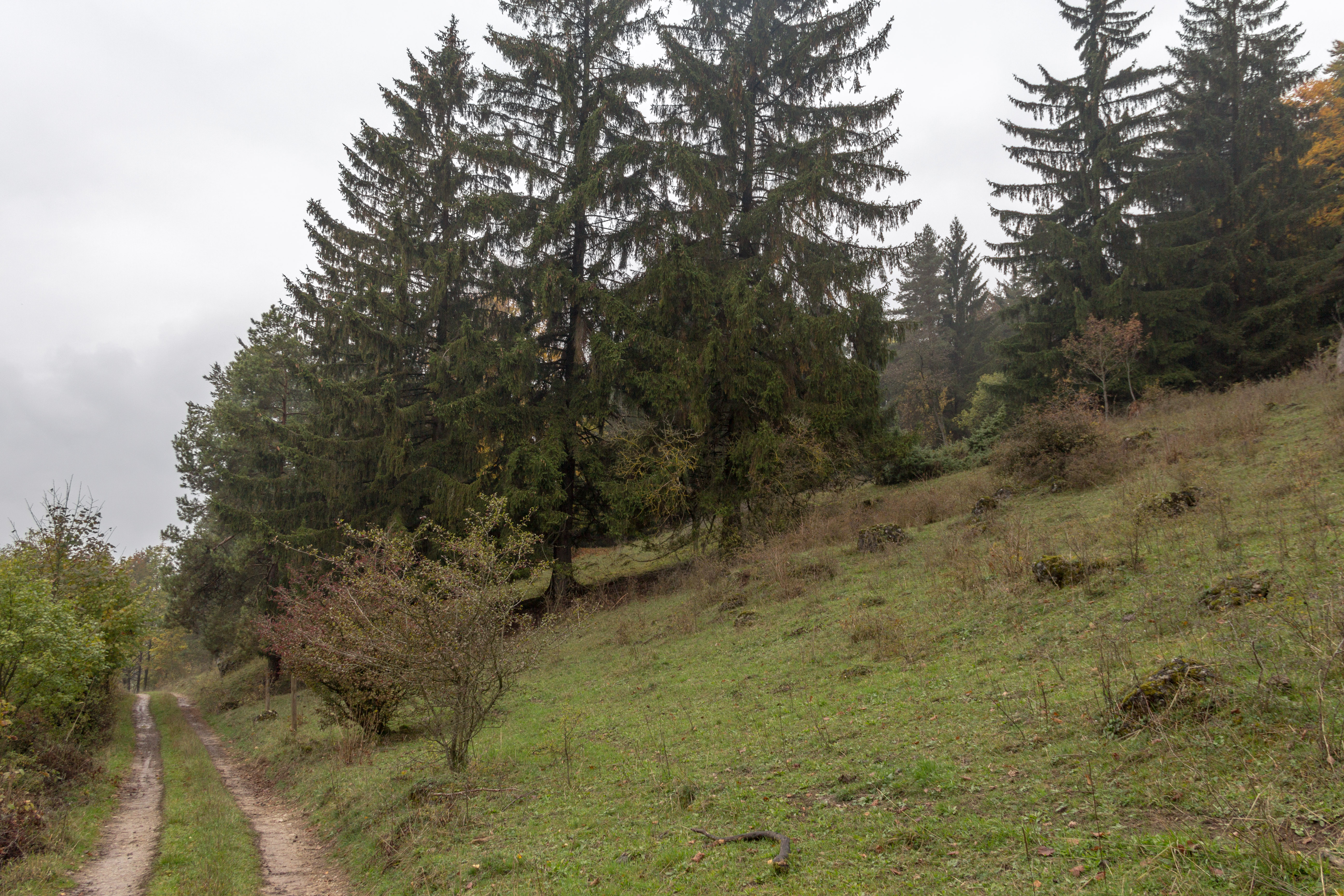 Heuchlinger Hutanger, Pommelsbrunn